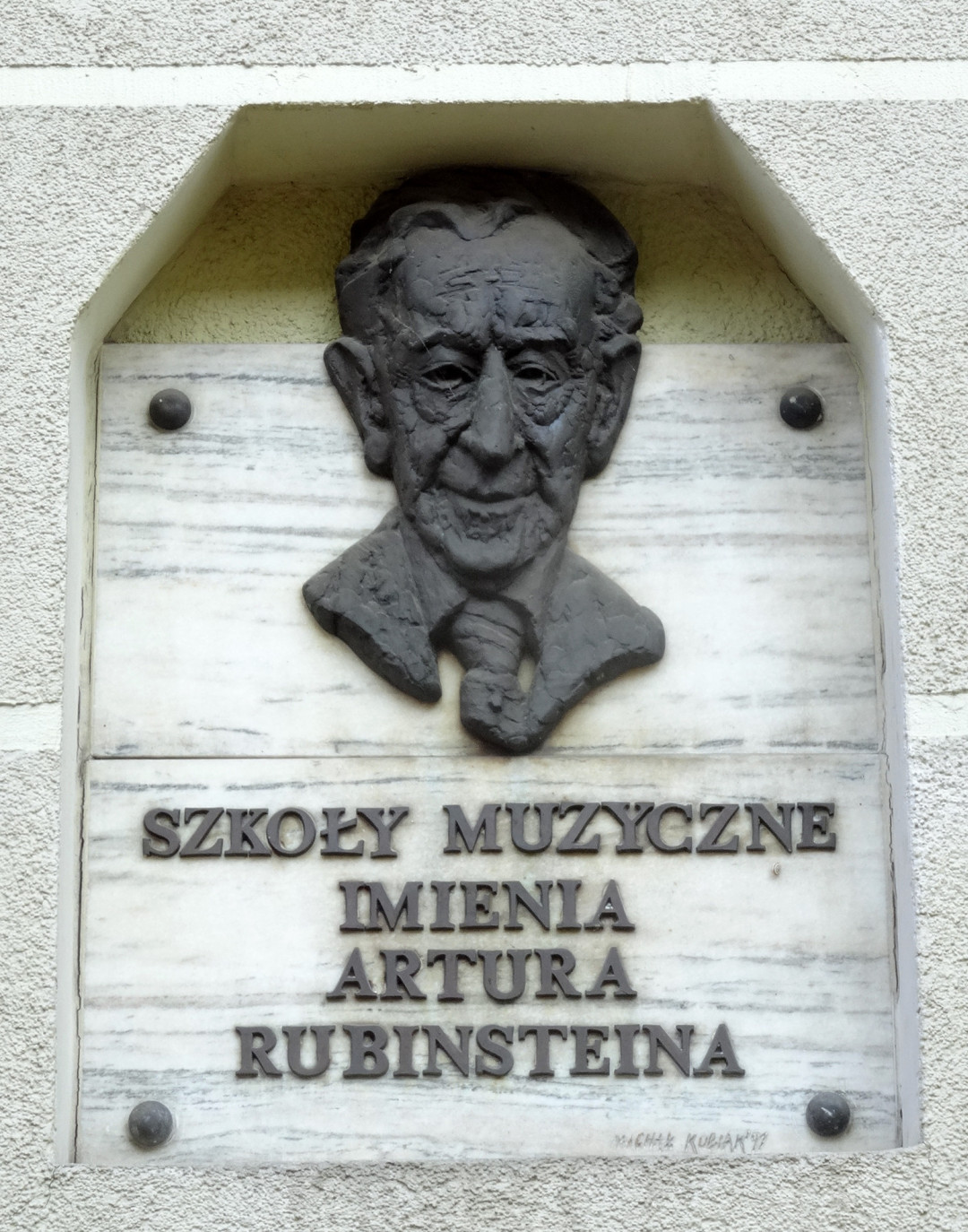 Zespół Szkół Muzycznych im. Artura Rubinsteina w Bydgoszczy, ul. Szwalbego 1 - tablica pamiątkowa patrona